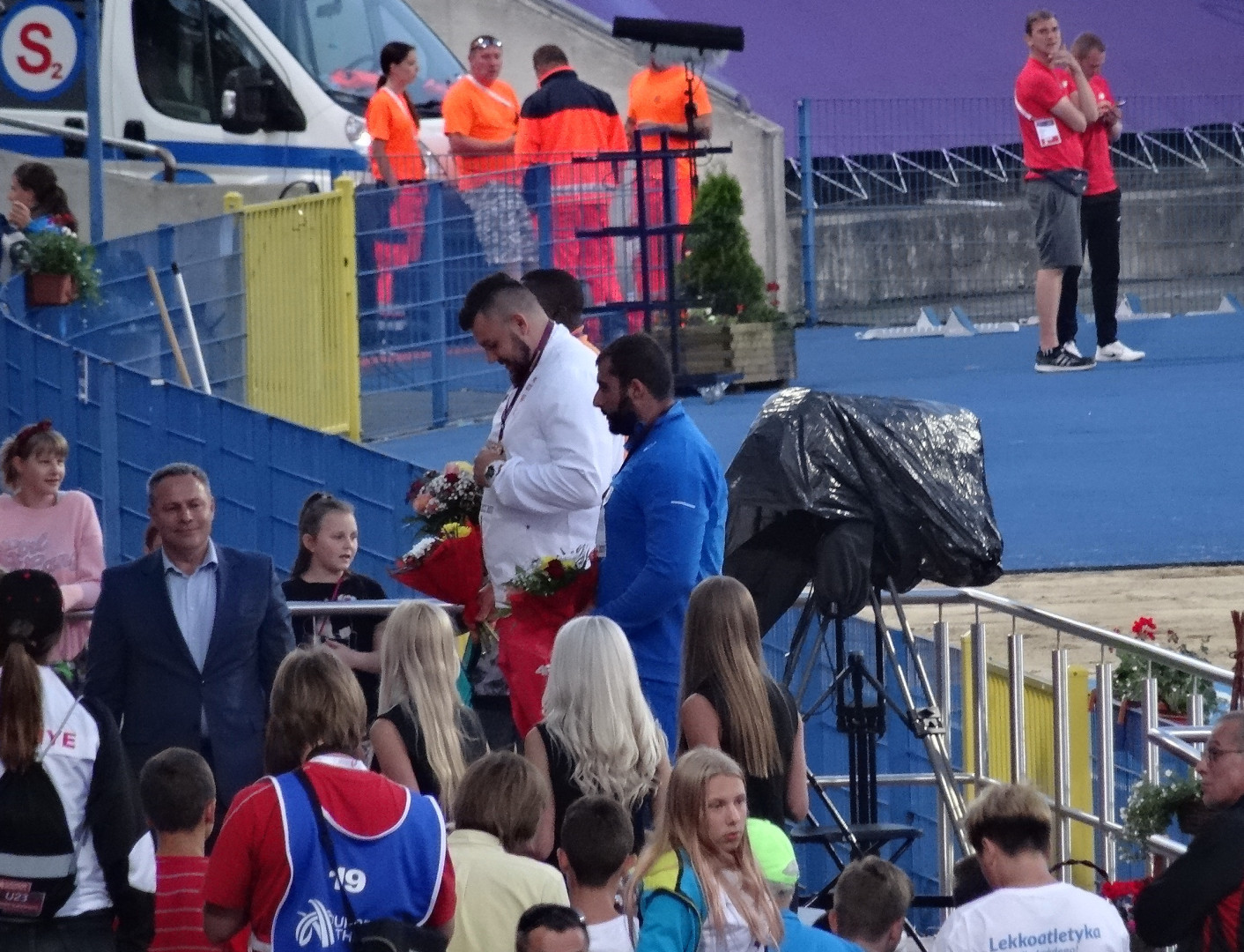 Młodzieżowe Mistrzostwa Europy w Lekkoatletyce U23 w Bydgoszczy 13-16 lipca 2017, ceremonia medalowa pchnięcia kulą mężczyzn